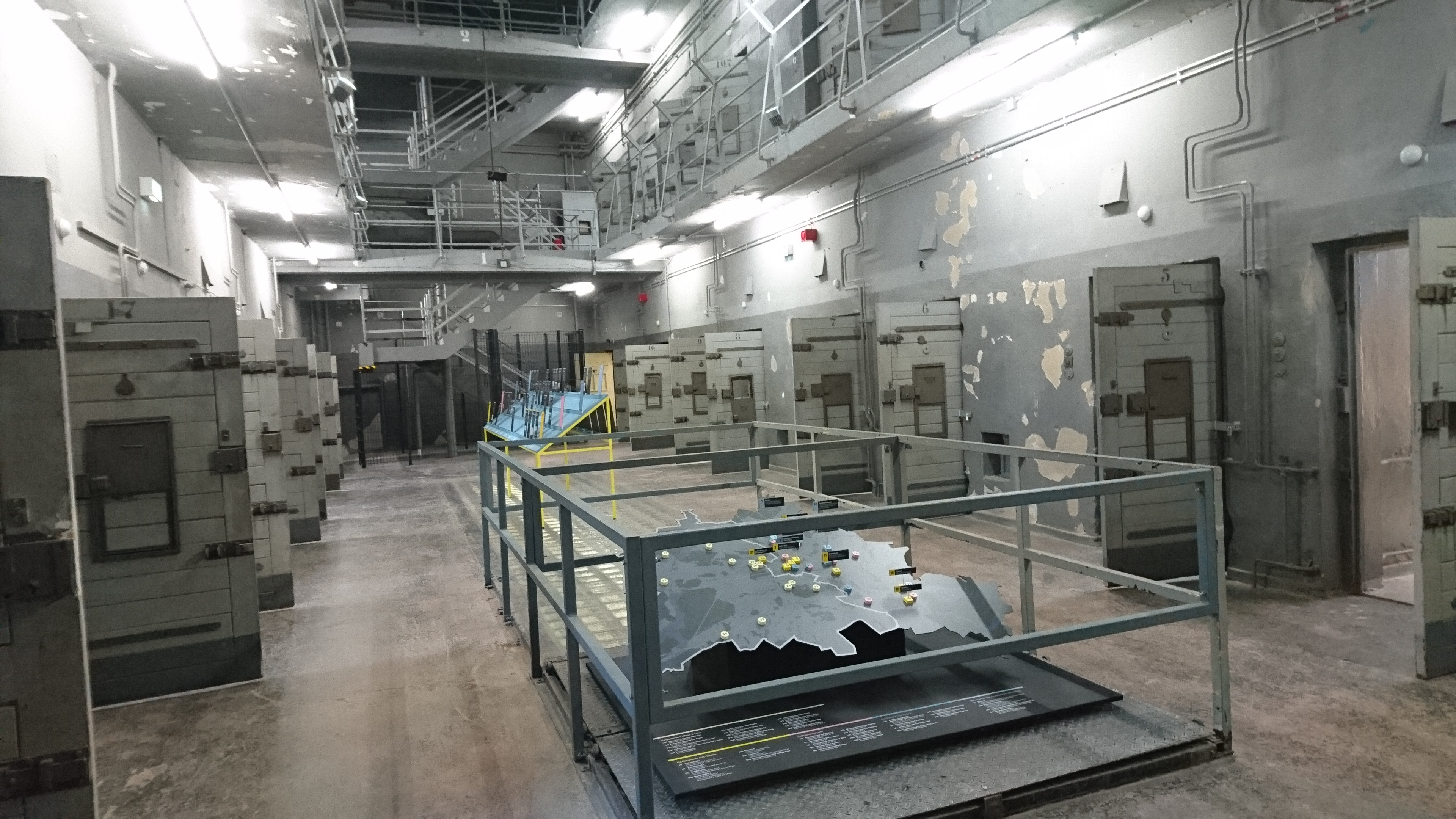 Blick in die ehemalige Hafthalle aus dem ersten Stock.